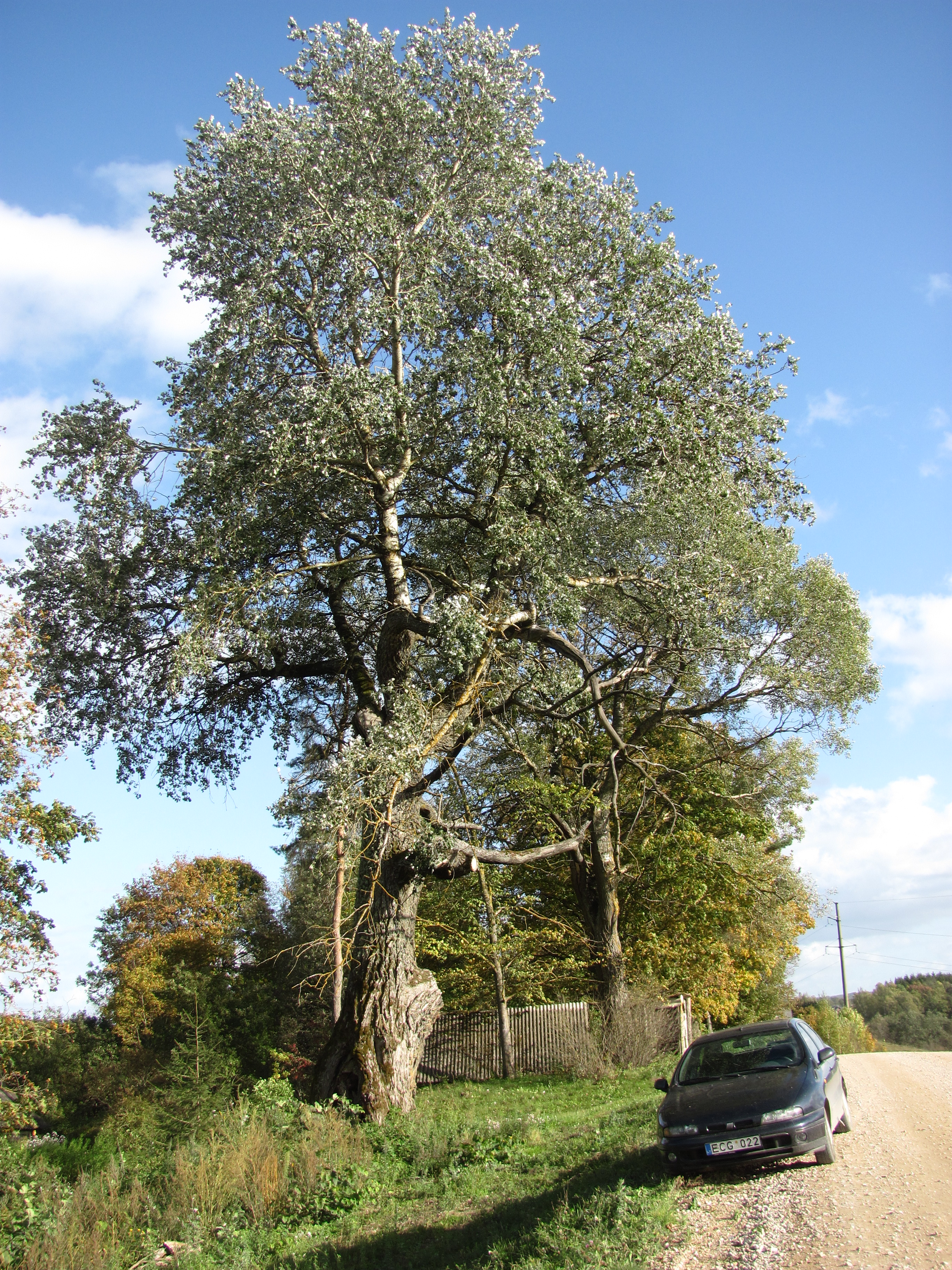 Obelių sen., Lithuania